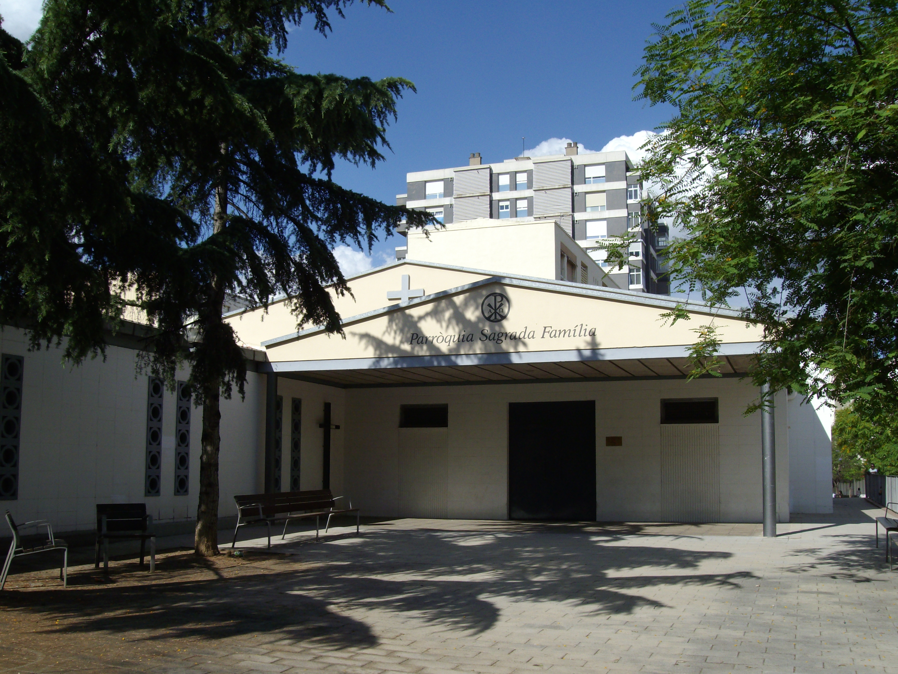 Parroquia de la Sagrada Família, Sabadell.